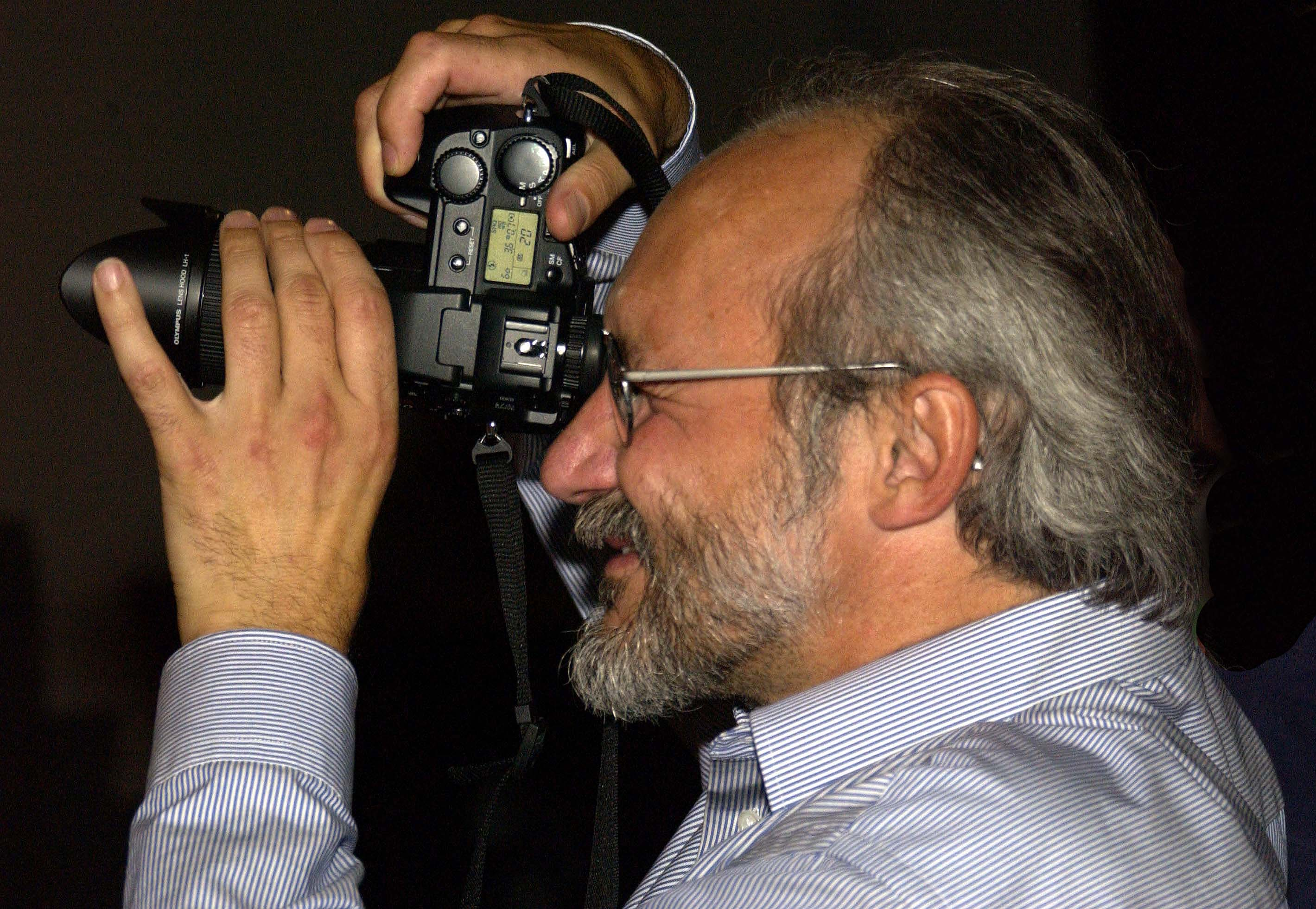 Herber Becke